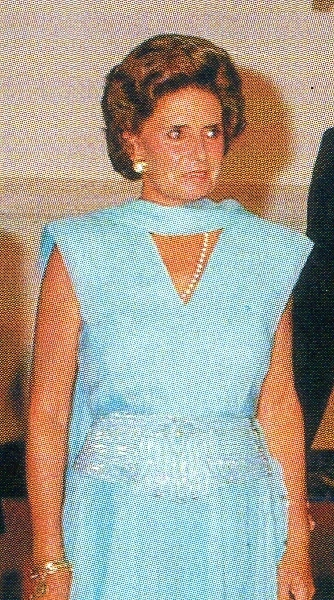 María Lorenza Barreneche en 1984.